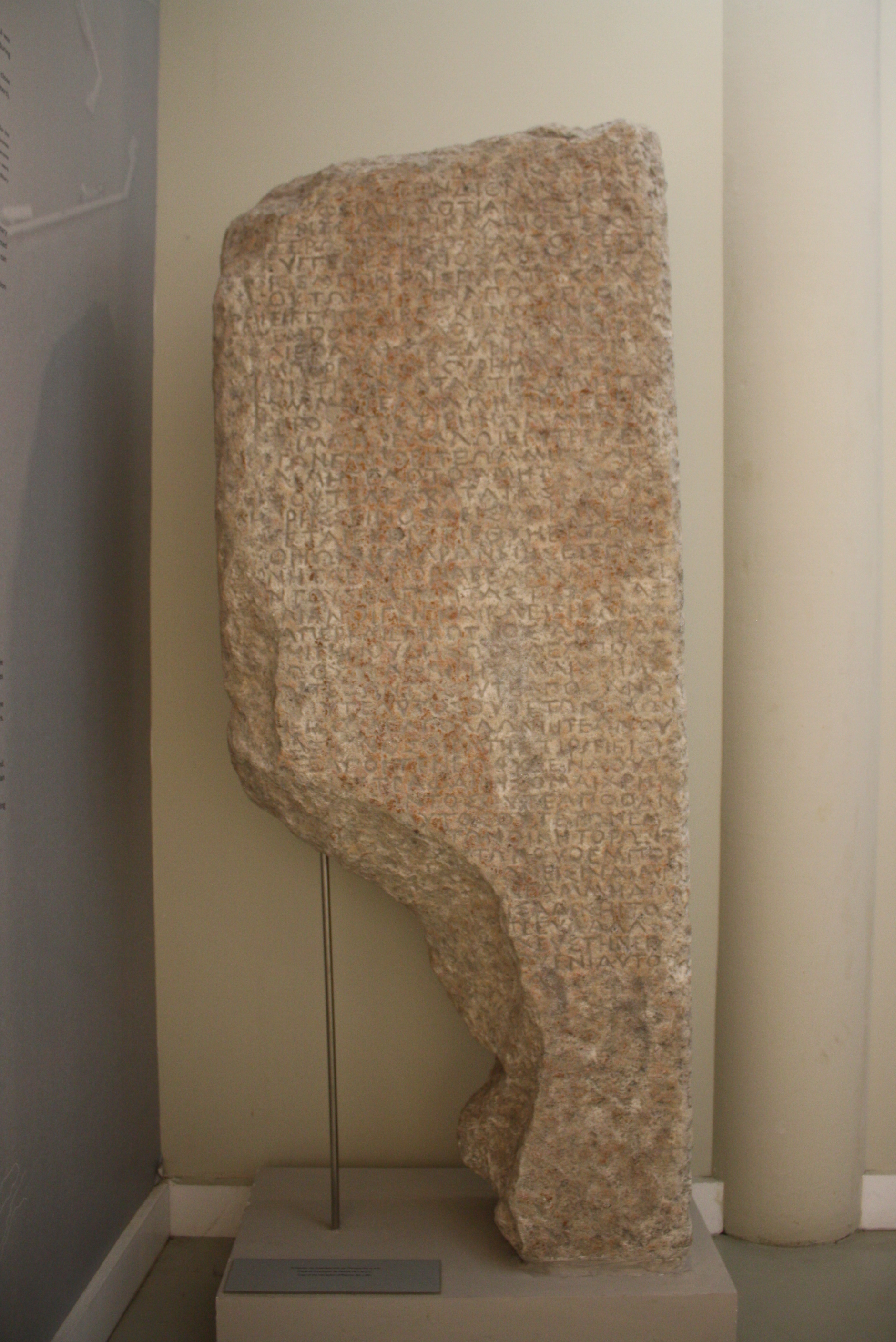 Kopie der Inschrift von Pistiros, einem Emporion der Insel Thasos, die sich mit den Thasiern und Händlern aus Apollonia und Maroneia beschäftigt und ihre Rechte/Pflichten beschreibt; Datierung 4. Jh. v. Chr. Die Kopie befindet sich im Archäologischen Museum Thasos